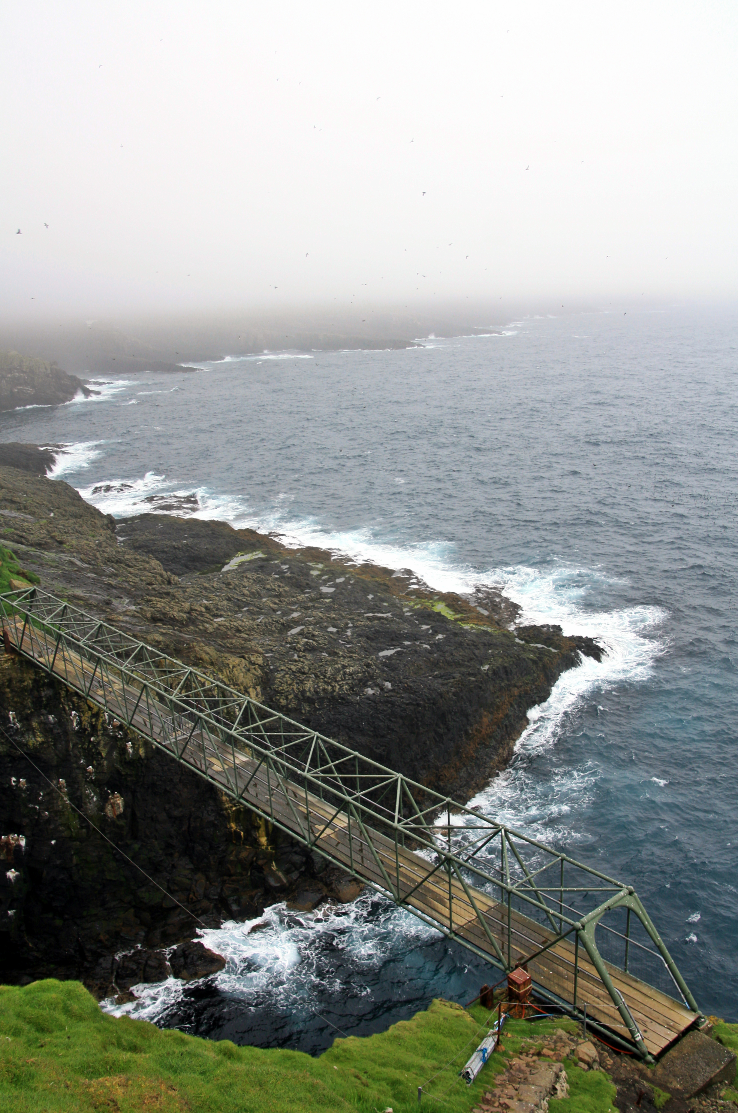 Mykines Holmur